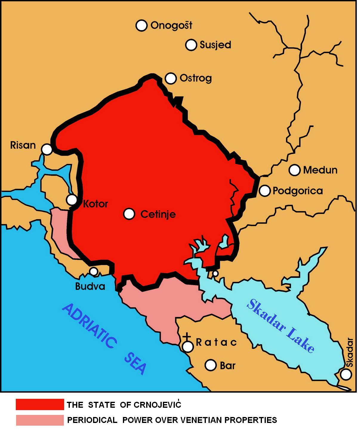 Map of Zeta under Ivan Crnojević